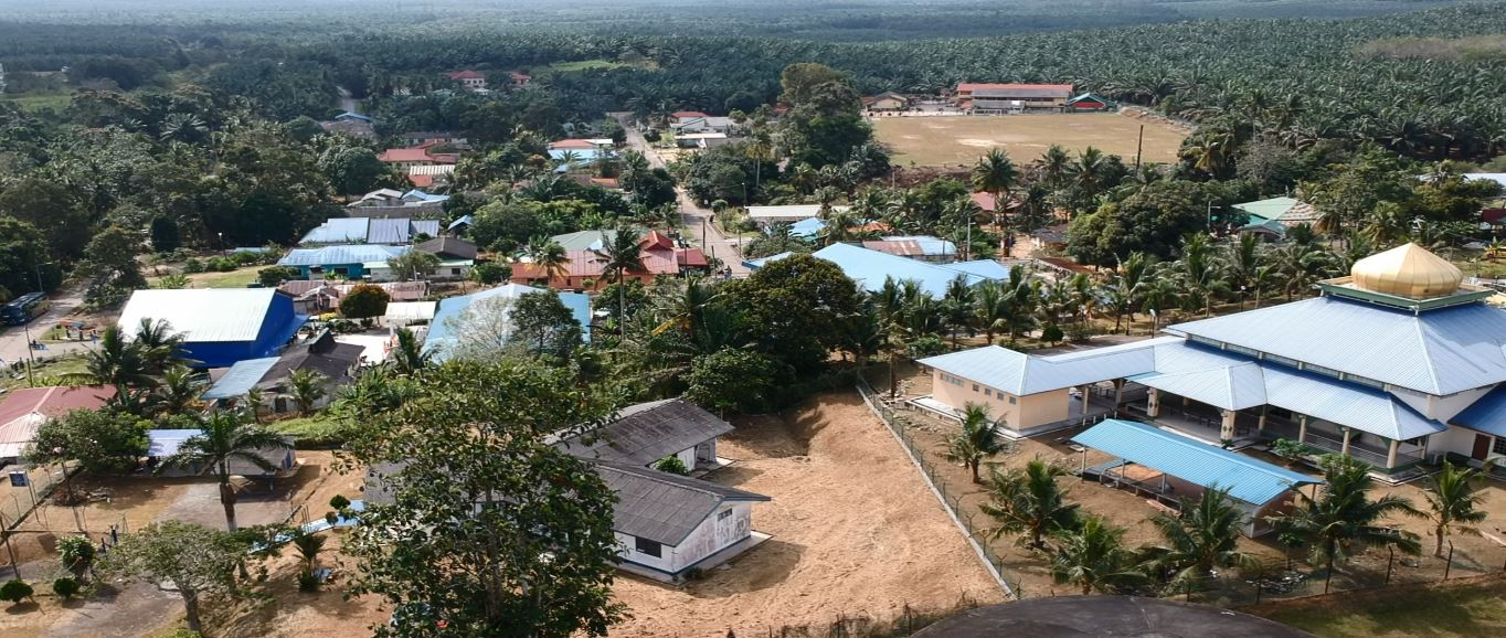 Pandangan Aerial Kampung Melayu Niyor